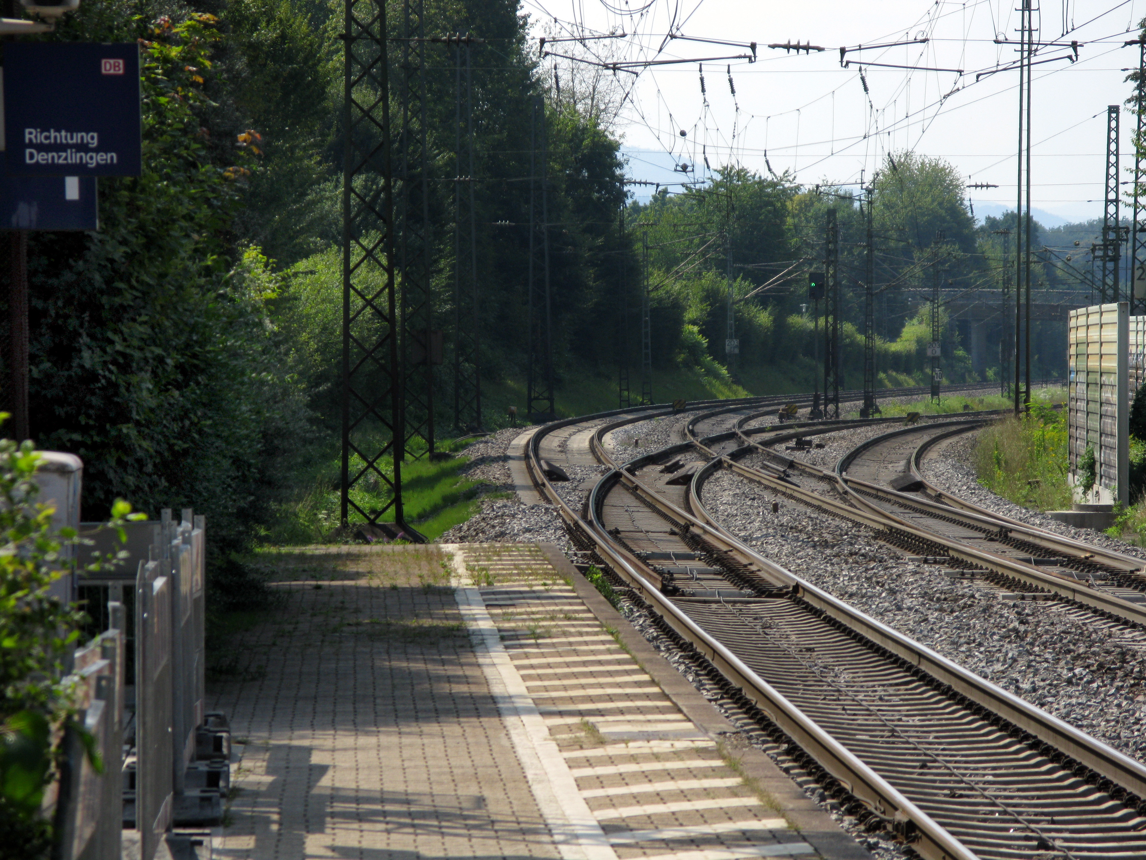 Abzweig der Güterumgehungsbahn Freiburg (rechts) von der Rheintalbahn bei Gundelfingen mit Breisgau S-Bahn in Fahrtrichtung Freiburg, Blick vom östlichen Bahnsteig des Haltepunktes Gundelfingen